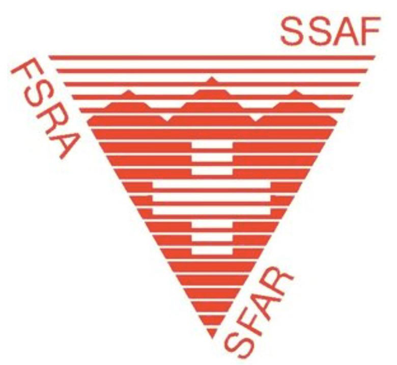 Logo der Schweizerischen Stiftung für Alpine Forschung